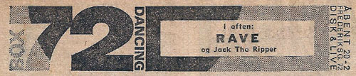 Avisannonce fra spillestedet "Box 72" i Århus, 18. juli 1972.